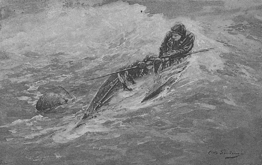 Plansch ur Eskimålif, 1891. Ursprunglig bildtext: "En kajakman ilar sin kantrade kamrat till hjälp".